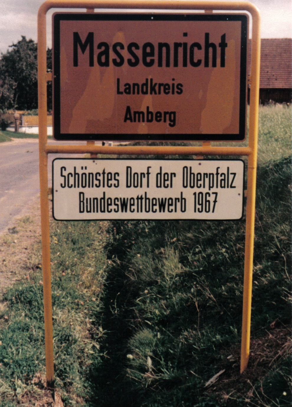 Bild muss entstanden zwischen 1967 (Massenricht war schönstes Dorf der Oberpfalz) und 1972/1973 (Auflösung des Landkreises Amberg)